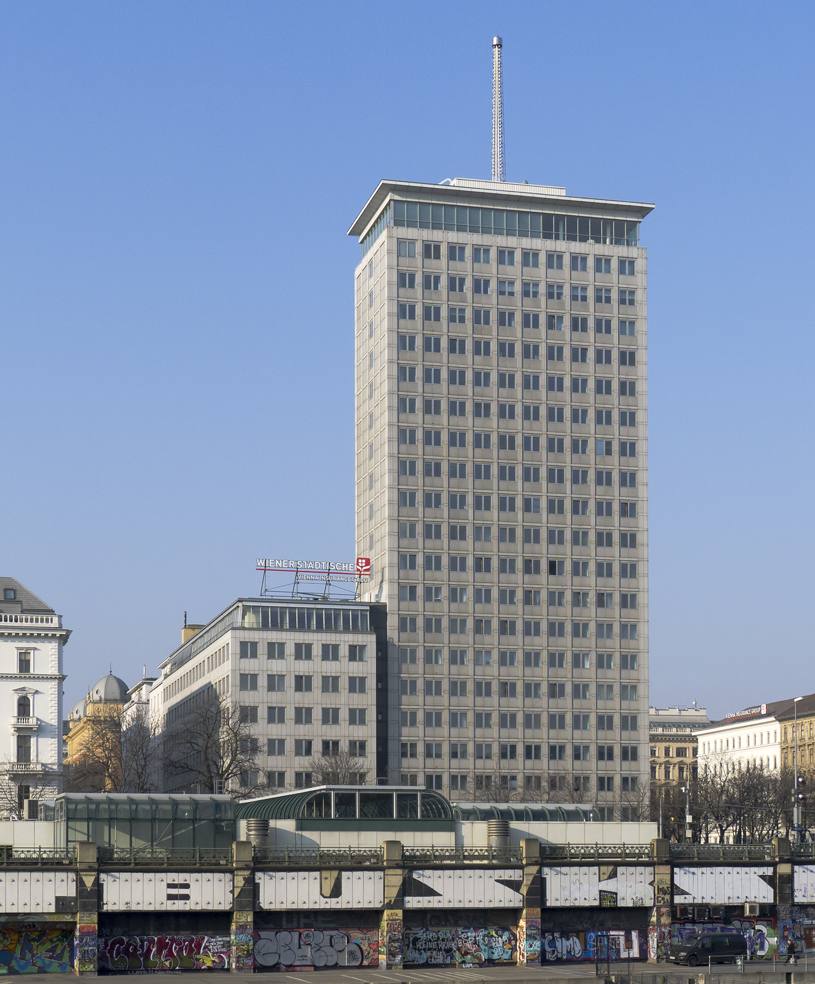 Ringturm in Wien 1 Richtung Südwest